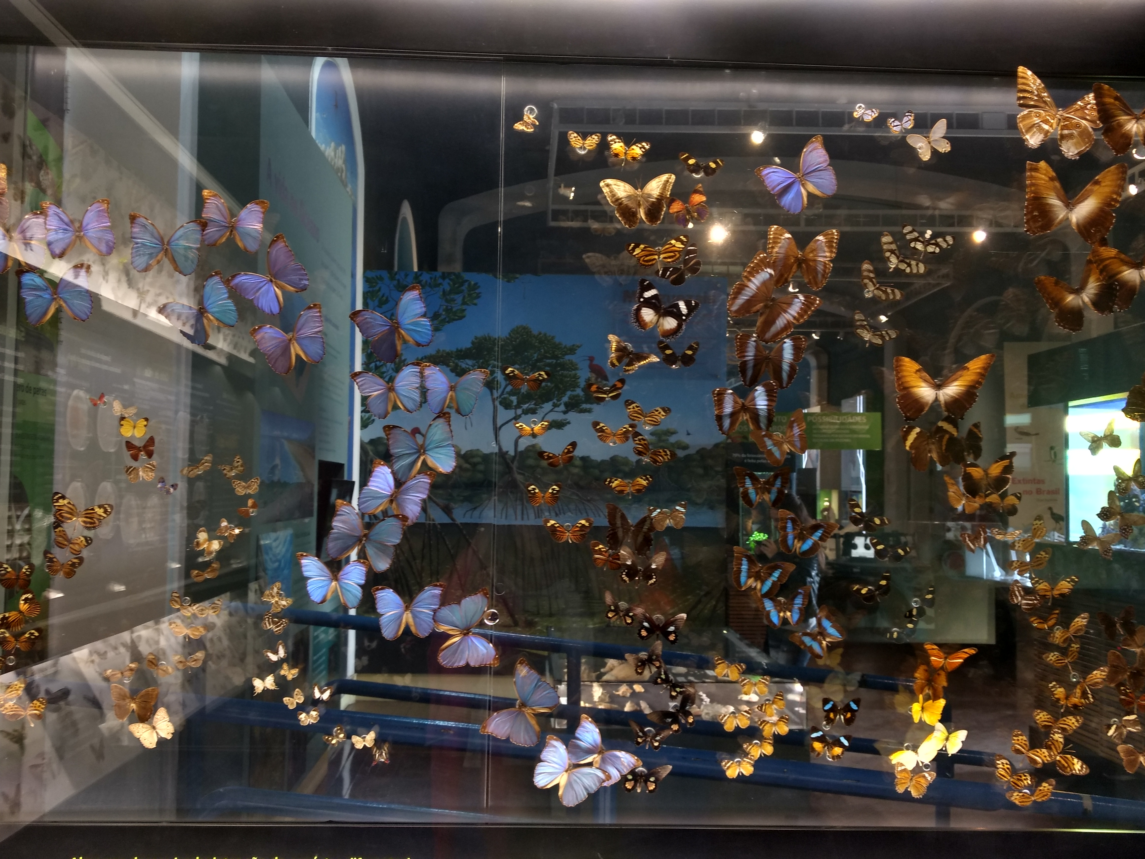 Catavento, borboletas.Sp.